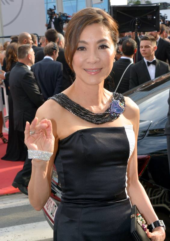 Michelle Yeoh au festival de Cannes